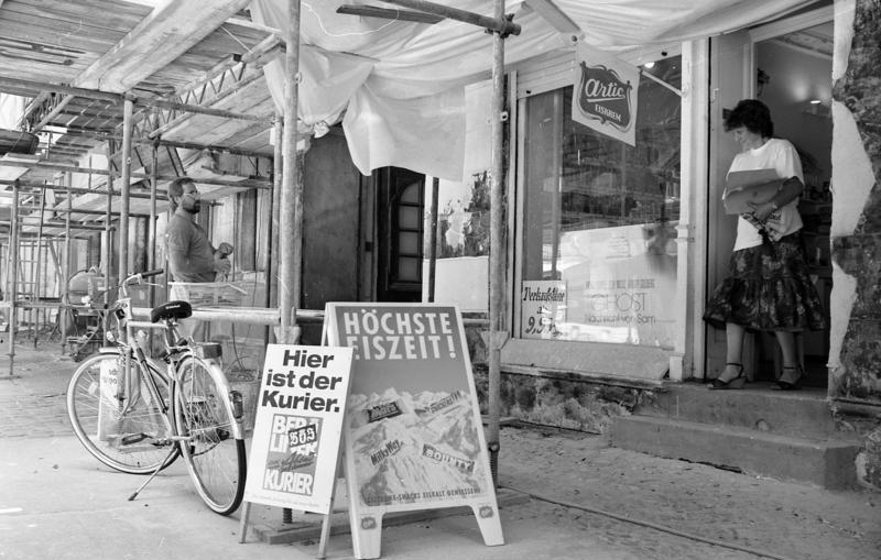 22.7.1991 Berlin-Prenzlauer Berg, Sredzkistraße